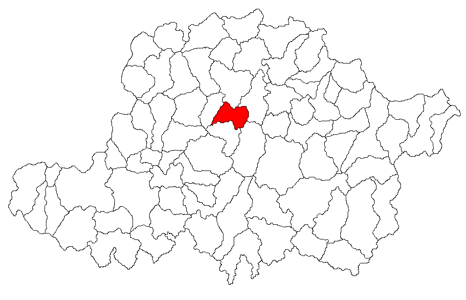 Categorie:Hărţi ale judeţului Arad